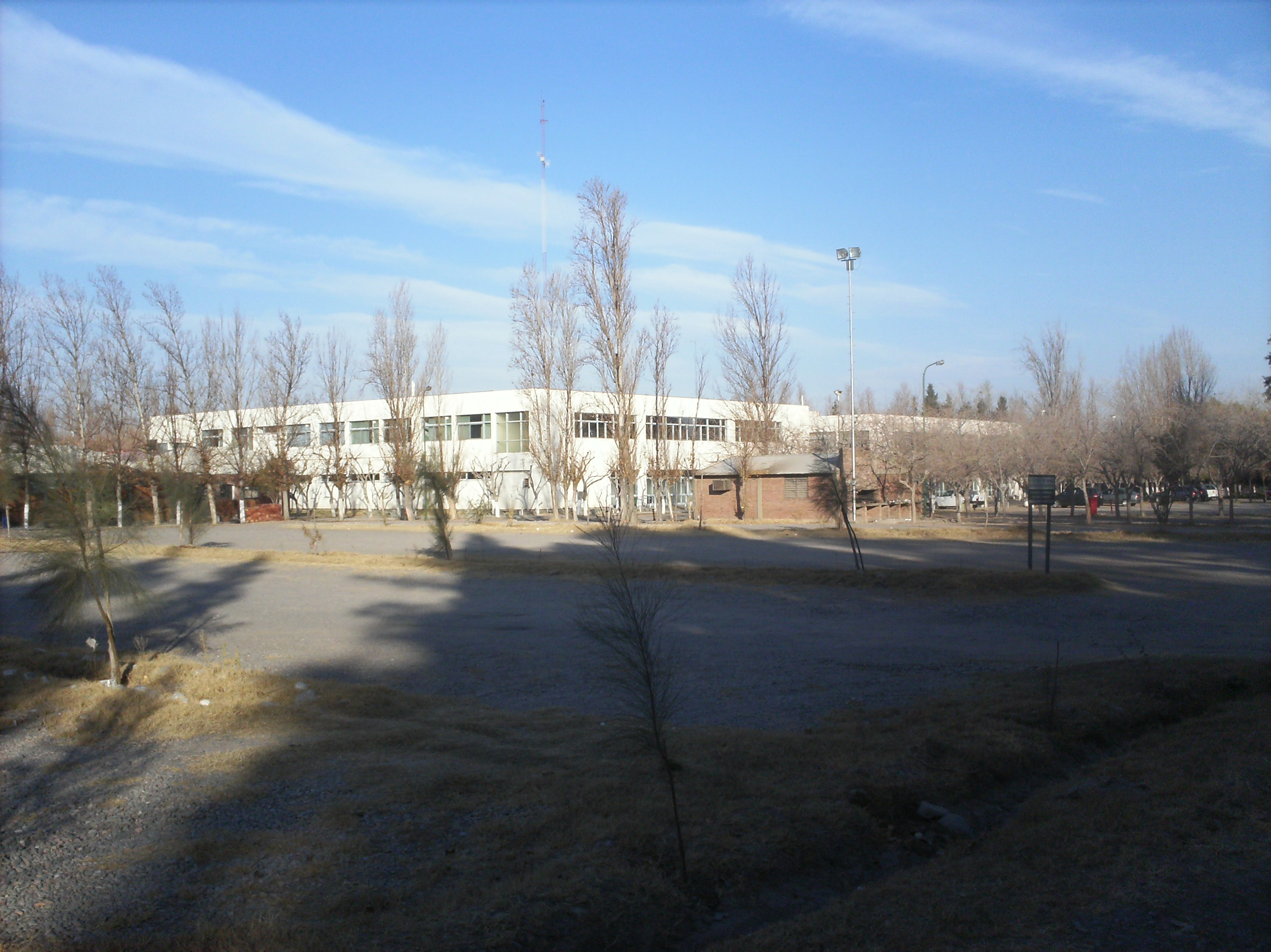 edificio de aulas de la catolica rodeado de extensa forestacion